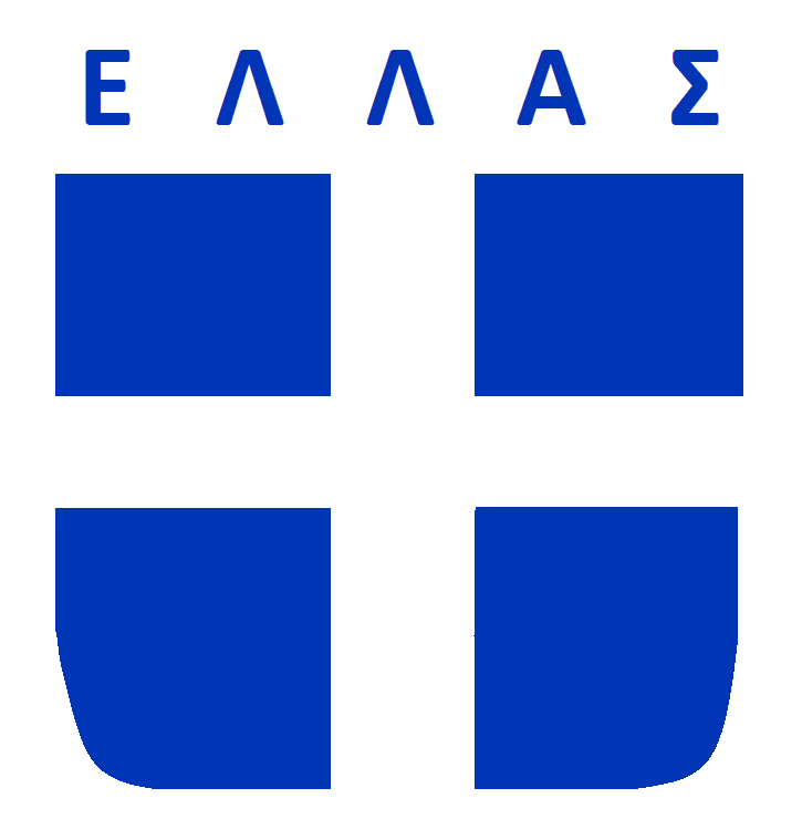 The logo of national Greek basketball team in 1986